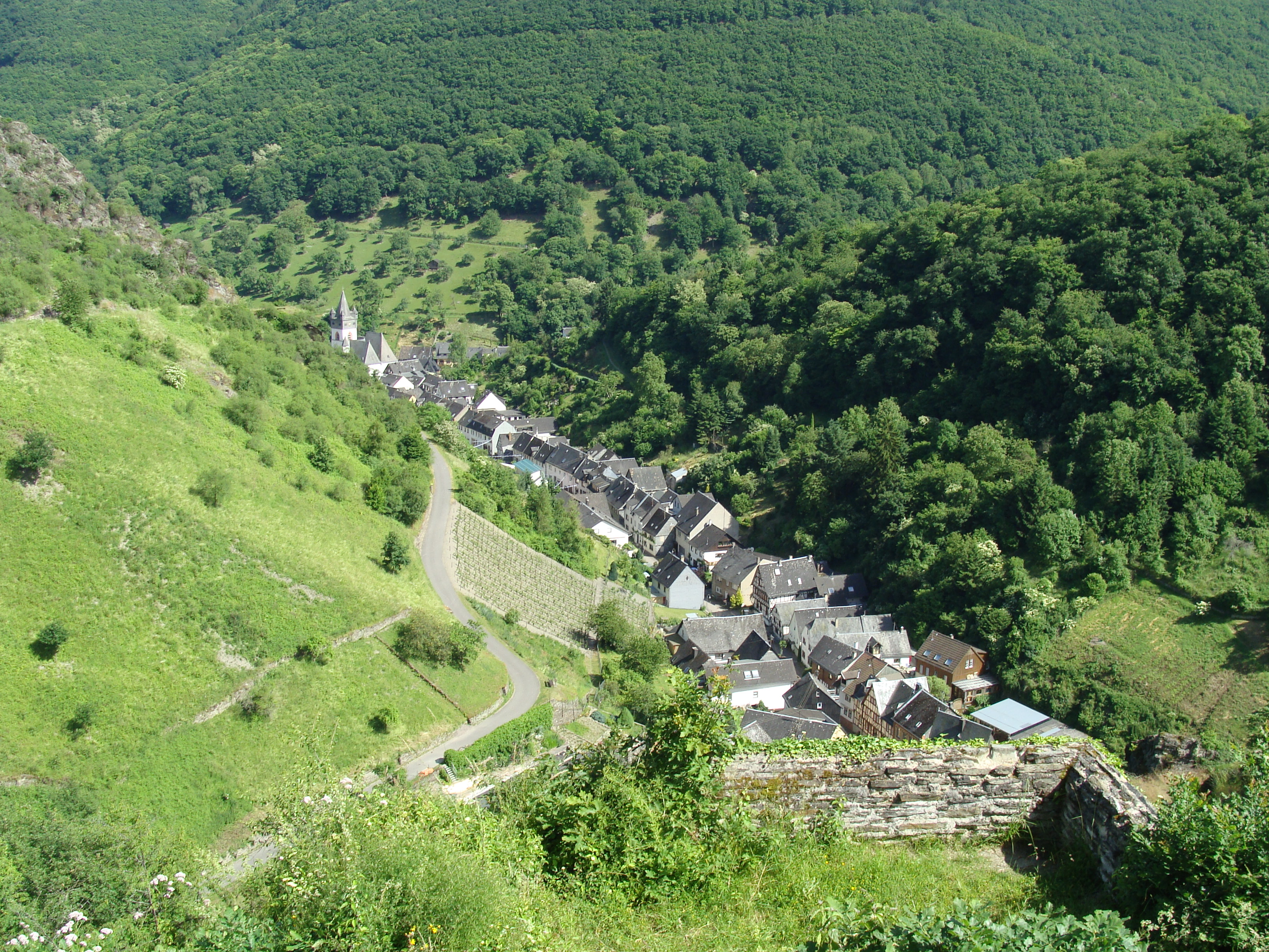 Bacharacher Ortstein Steeg - Ansicht von der Ruine Stahlberg